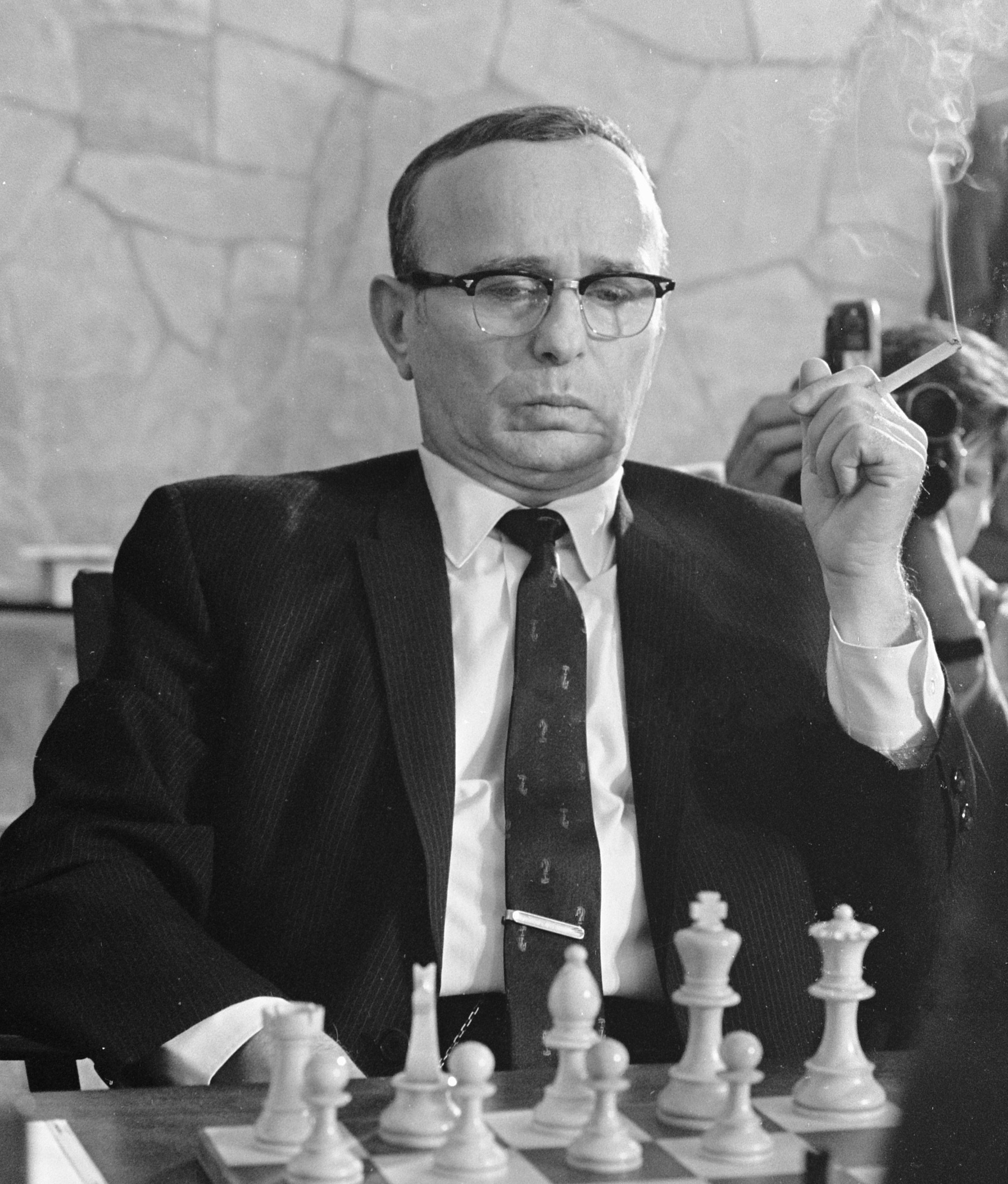 Collectie / Archief : Fotocollectie Anefo Reportage / Serie : [ onbekend ] Beschrijving : Kandidaten toernooi Kortsjnoi tegen Reskevsky. Reskevesky tijdens wedstrijd (USA) Datum : 8 mei 1968 Trefwoorden : kandidaten, schaken, toernooien Persoonsnaam : Kortsjnoi, Viktor, Reshevsky, Samuel Fotograaf : Kroon, Ron / Anefo Auteursrechthebbende : Nationaal Archief Materiaalsoort : Negatief (zwart/wit) Nummer archiefinventaris : bekijk toegang 2.24.01.05 Bestanddeelnummer : 921-3316